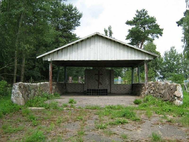 Загорнае. Капліца